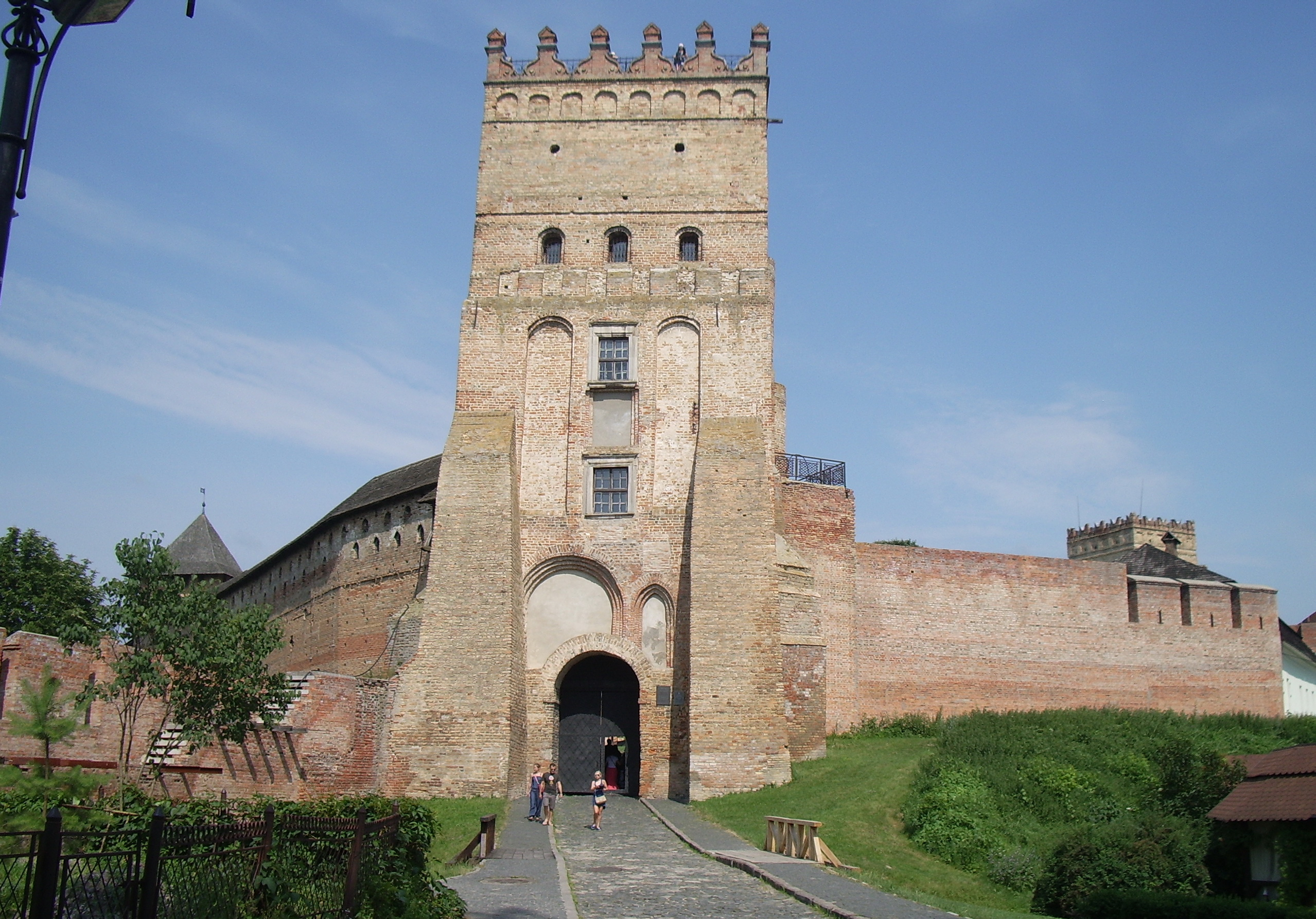 В'їзна (Надбрамна) башта (мур.), Луцьк, вул. Кафедральна, 1а